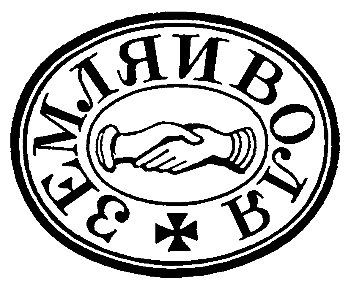 Simbolo del movimento Zemlja i Volja